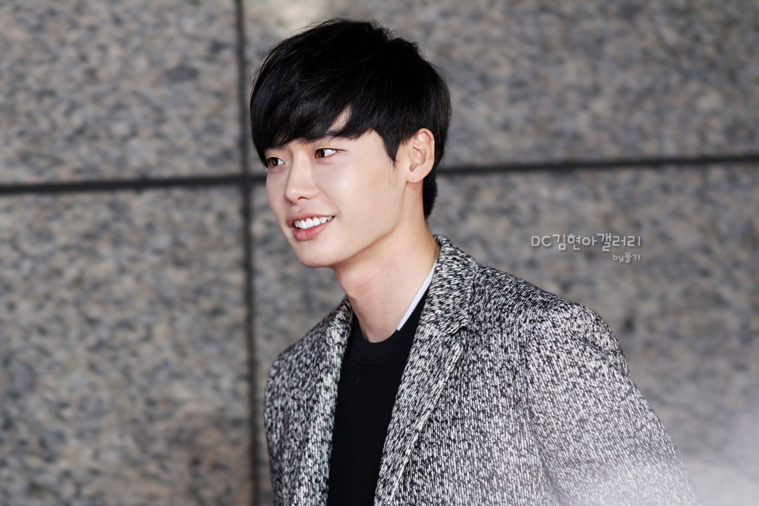 2013년 9월 27일 보그 패션 나잇 아웃에서 이종석.